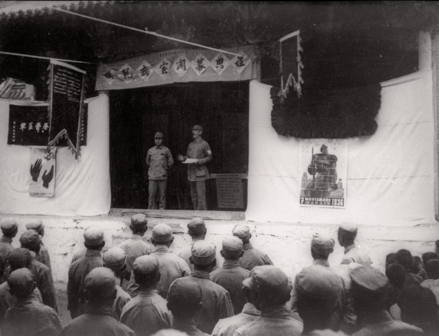 中文（香港）: Bethune ward